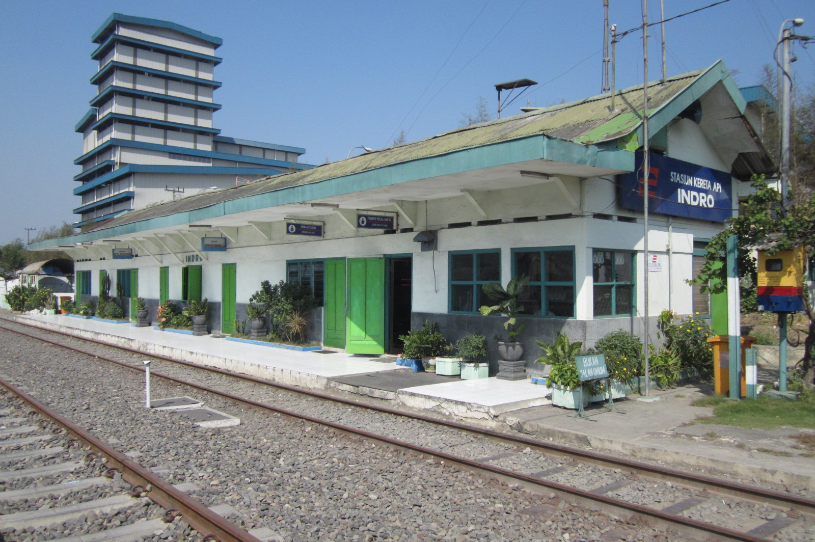 Bangunan utama Stasiun Indro, Kabupaten Gresik